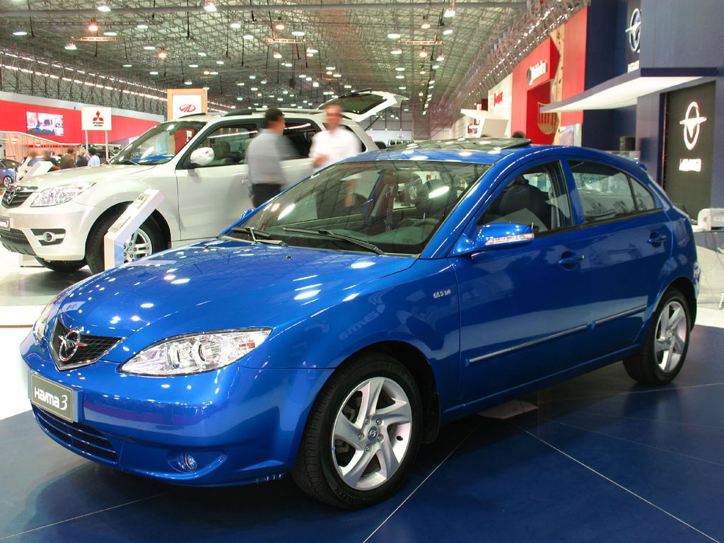 Haima 3 GLS 1.6 2010